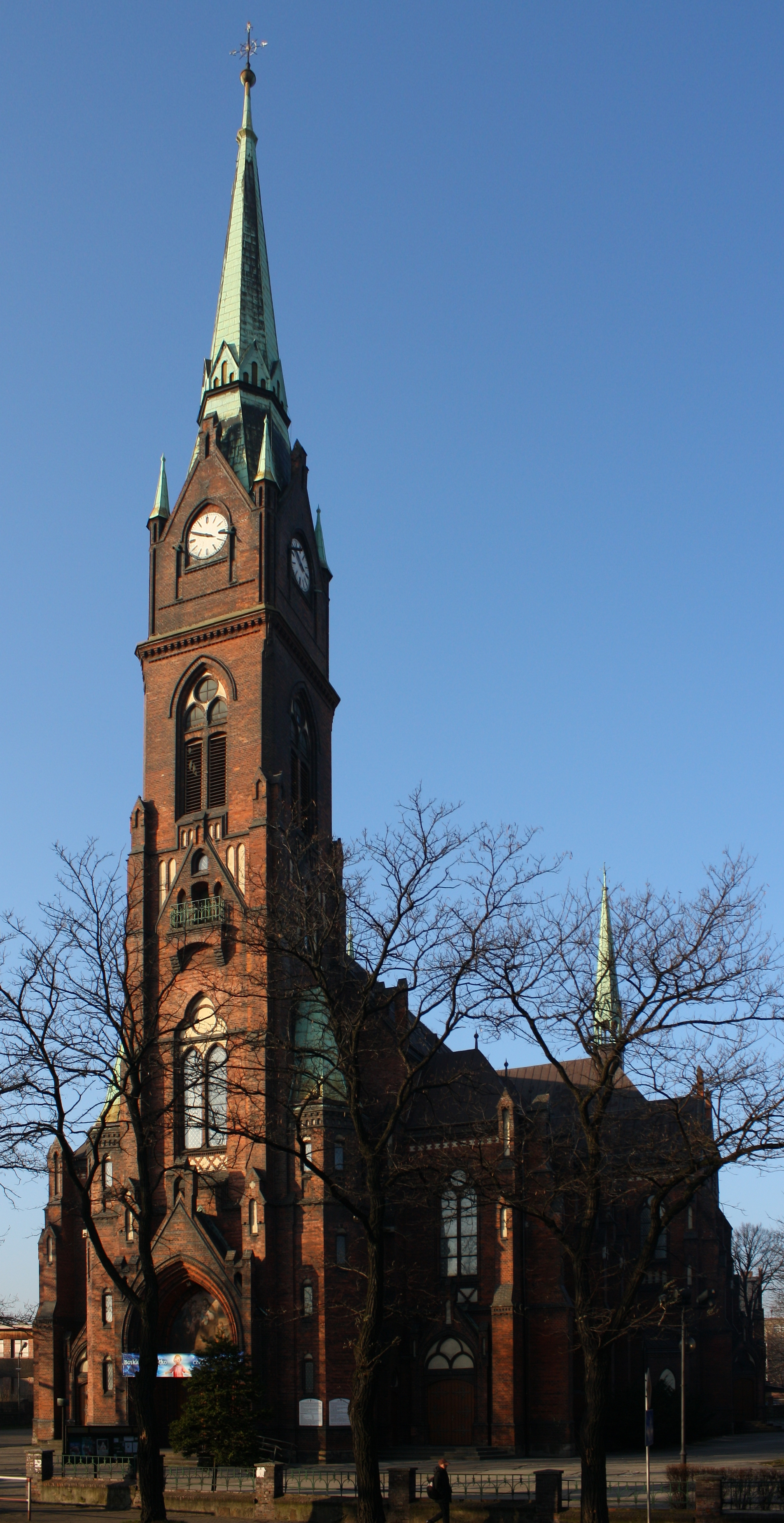 Chorzów - Batory (d. Wielkie Hajduki) Kościół NMP,widok na fasadę